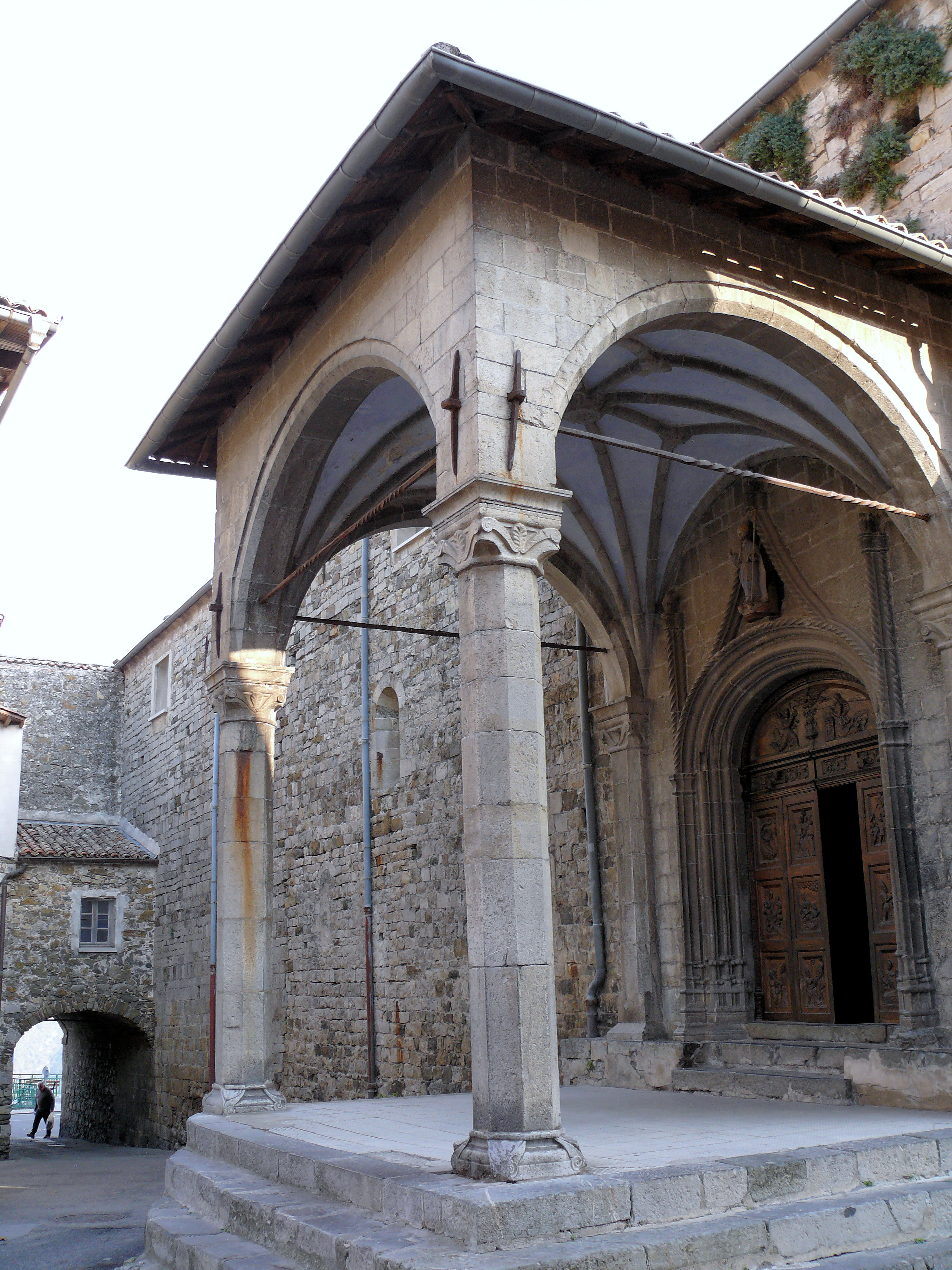 Utelle - Église Saint-Véran - Porche d'entrée et entrée du village